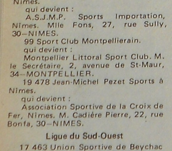 extrait du FFO No.1268